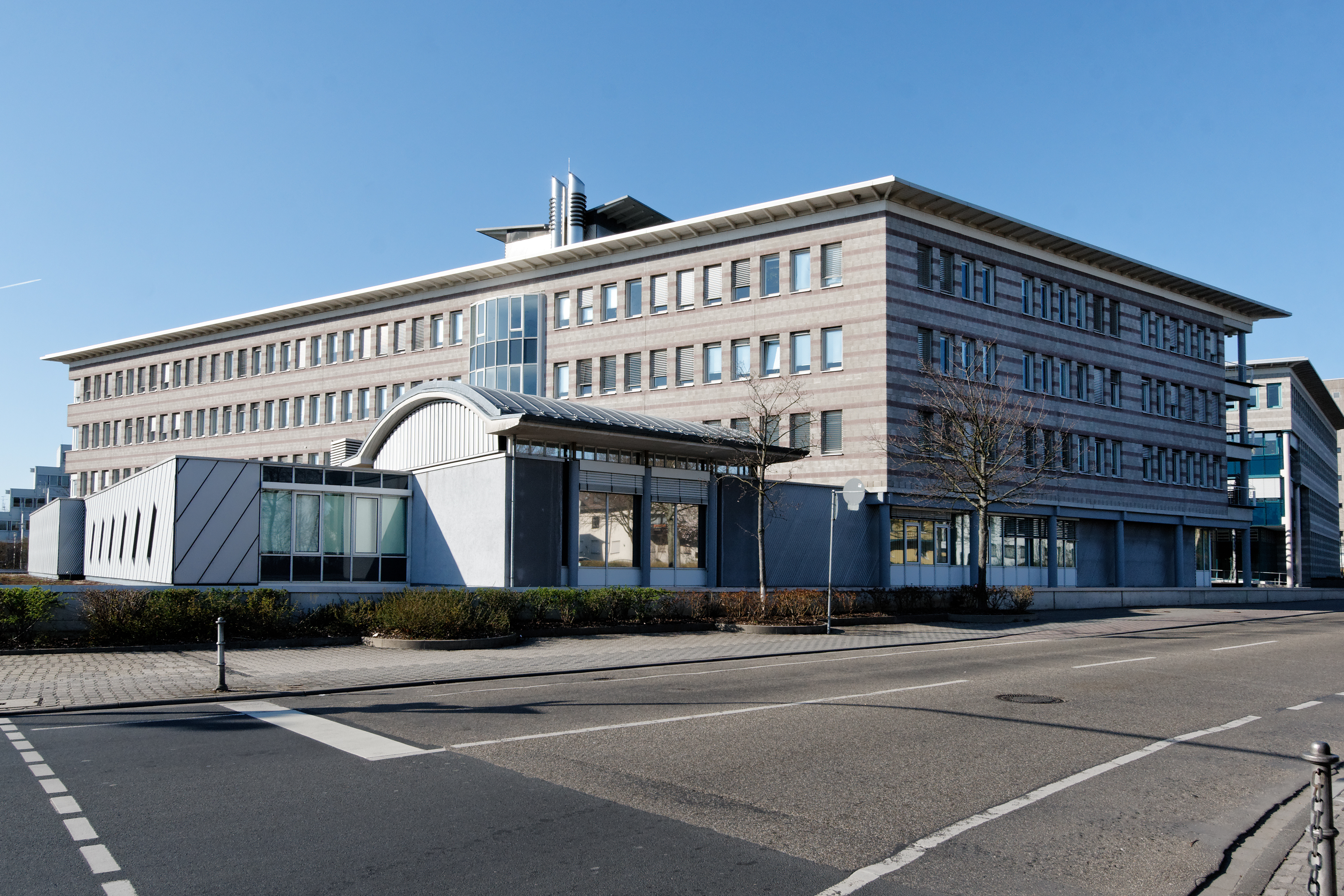 Amtsgericht in Langen (Hessen), erbaut 1991.